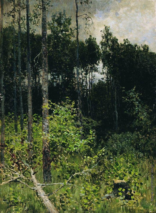 «Асінавы гаёк. Шэры дзень» (1884 г. П., а. 38,5х 27,3. Злева ўнізе: И. Левитанъ. Набыты ў 1966 г. у прыватнага ўладальніка.)